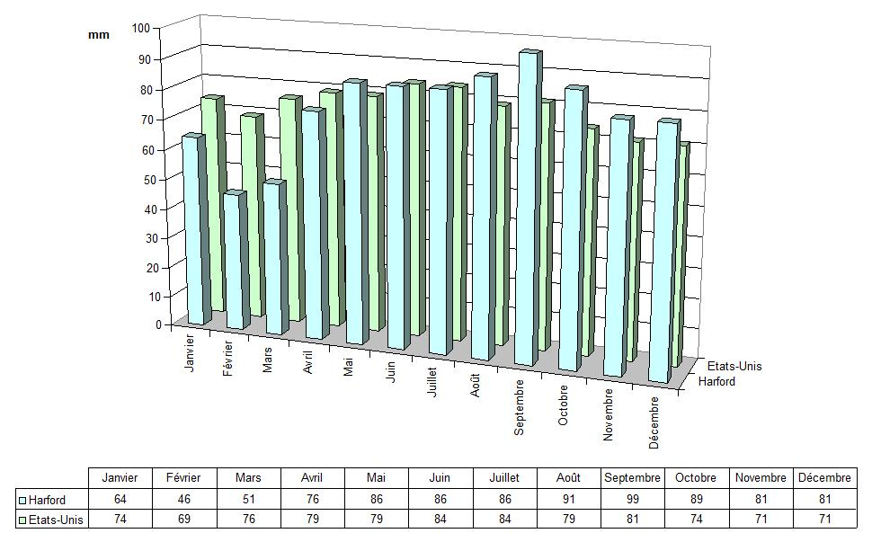 Pluviométrie à Hartford (Michigan) et dans l'ensemble des Etas-Unis.